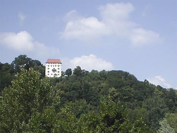 Schloss Neuburg über Obrigheim (Baden), typische Ansicht vom Neckartal aus